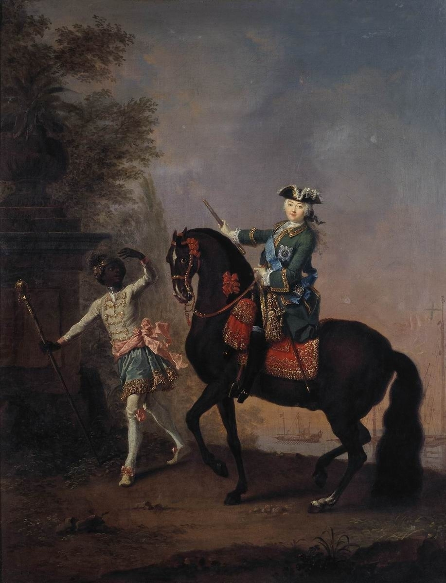 Императрица изображена в мундире Преображенского полка – первого полка русской гвардии. Но в трактовке немецкого художника Елизавета Петровна представлена не столько воинственной государыней, сколько кокетливой светской дамой, облачившейся в мужской костюм и выехавшей на конную прогулку в сопровождении причудливо одетого слуги-арапчонка. Условно написанные детали – пышная листва деревьев, парковая скульптура, водоем на дальнем плане – придают пейзажу декоративный характер. Водная гладь водоема, корабль ассоциируются с российским флотом – любимым детищем Петра I, но в картине это выглядит как парковый пруд с прогулочной яхтой. Повышенную декоративность придает картине колорит, построенный на переливах голубовато-зеленых и сиренево-розовых тонов. Парадному императорскому придан характер изящного, камерного, декоративного произведения.